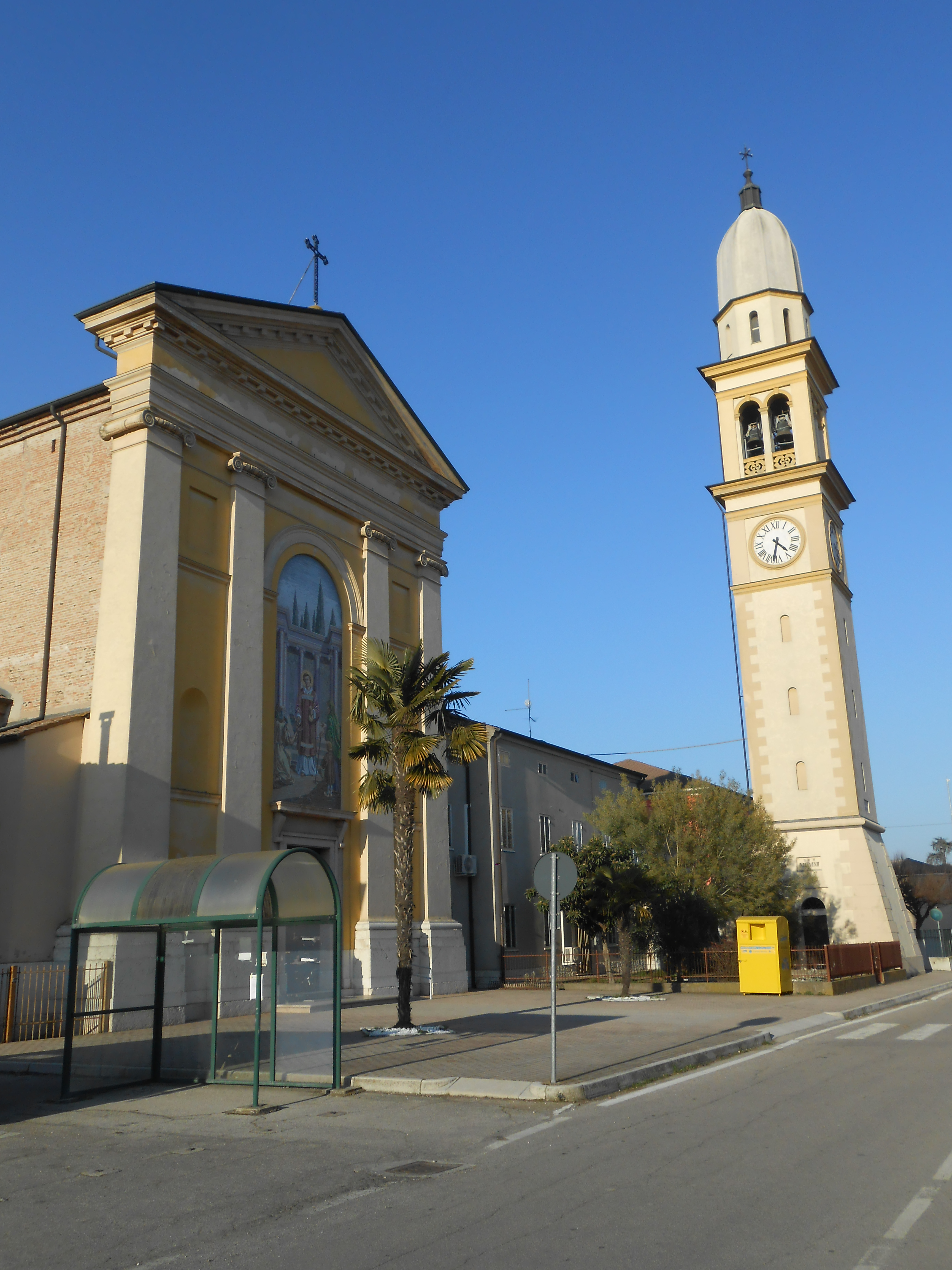 parrocchia Di San Lorenzo Martire, Begosso, Terrazzo